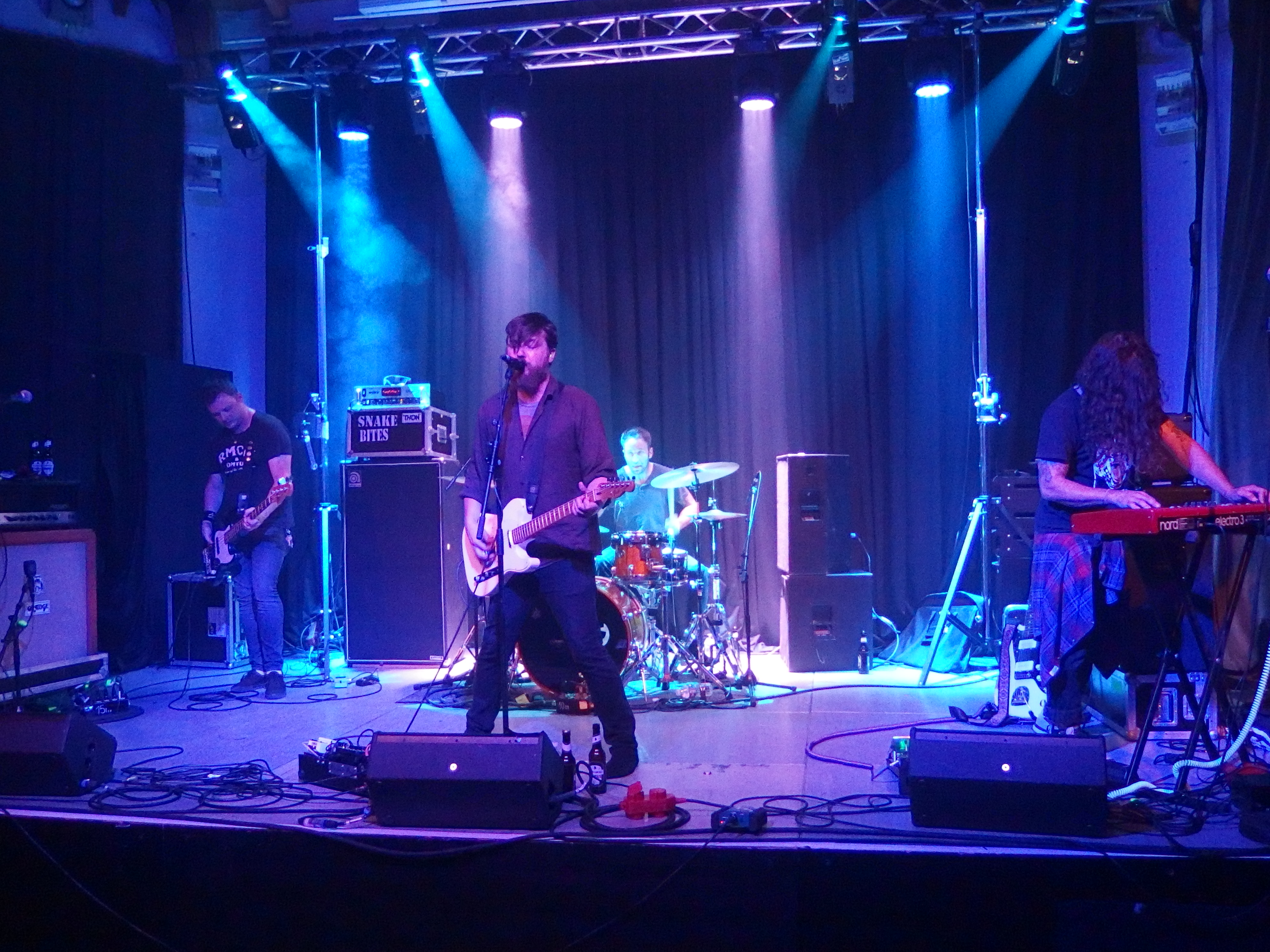 Static Age live auf dem Rock Your Holidays Festival in Neunkirchen (Saar)